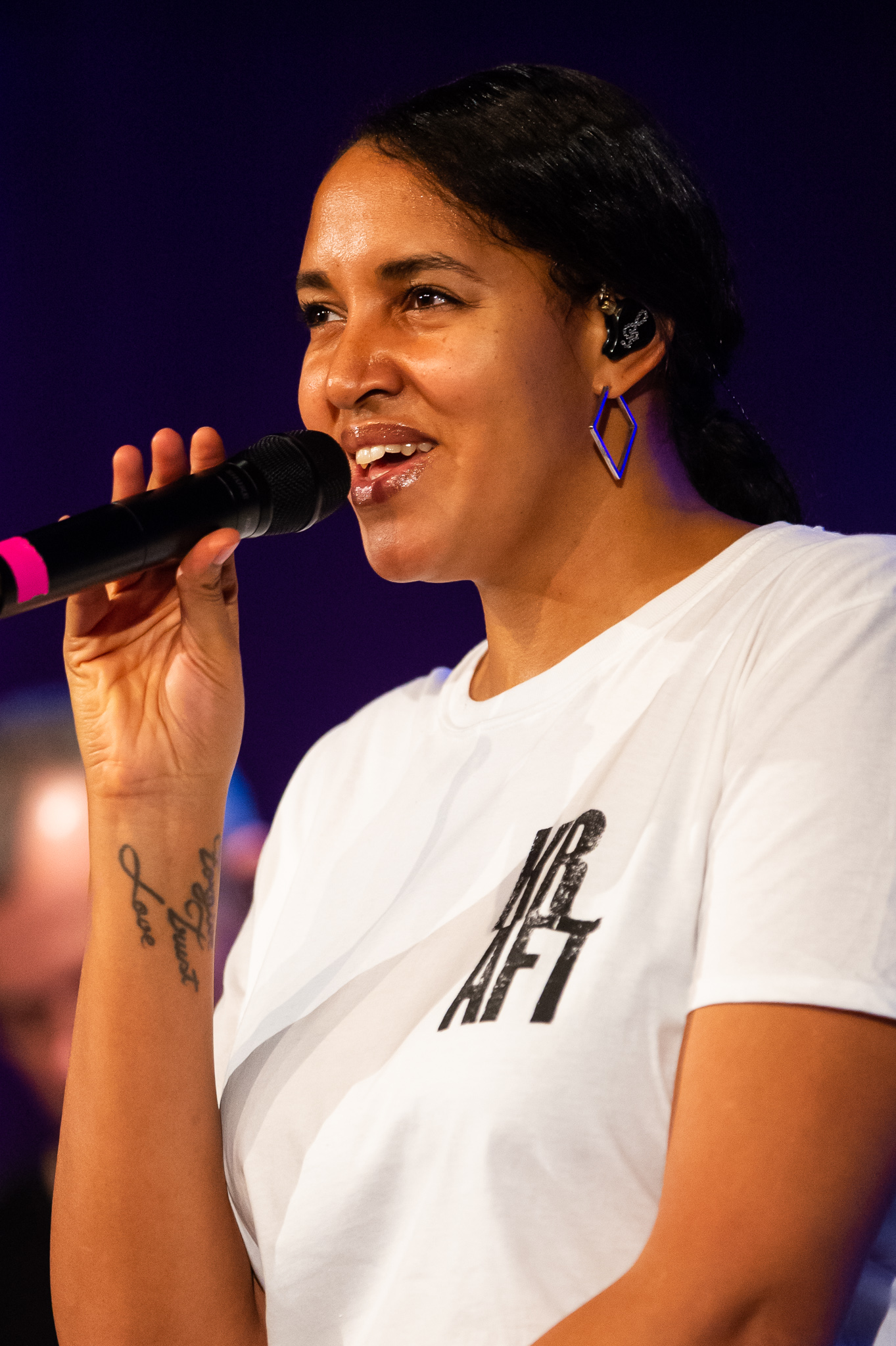 Cassandra Steen,Concertbüro Franken,Glashaus,Konzert,Livekonzert,Livemusik,Markgrafensaal,Musik